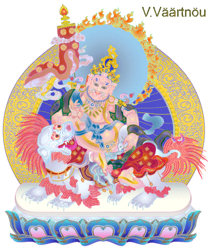 Vaishravana troonil. Vello Väärtnõu poolt tehtud Vaishravana thanka jaoks.